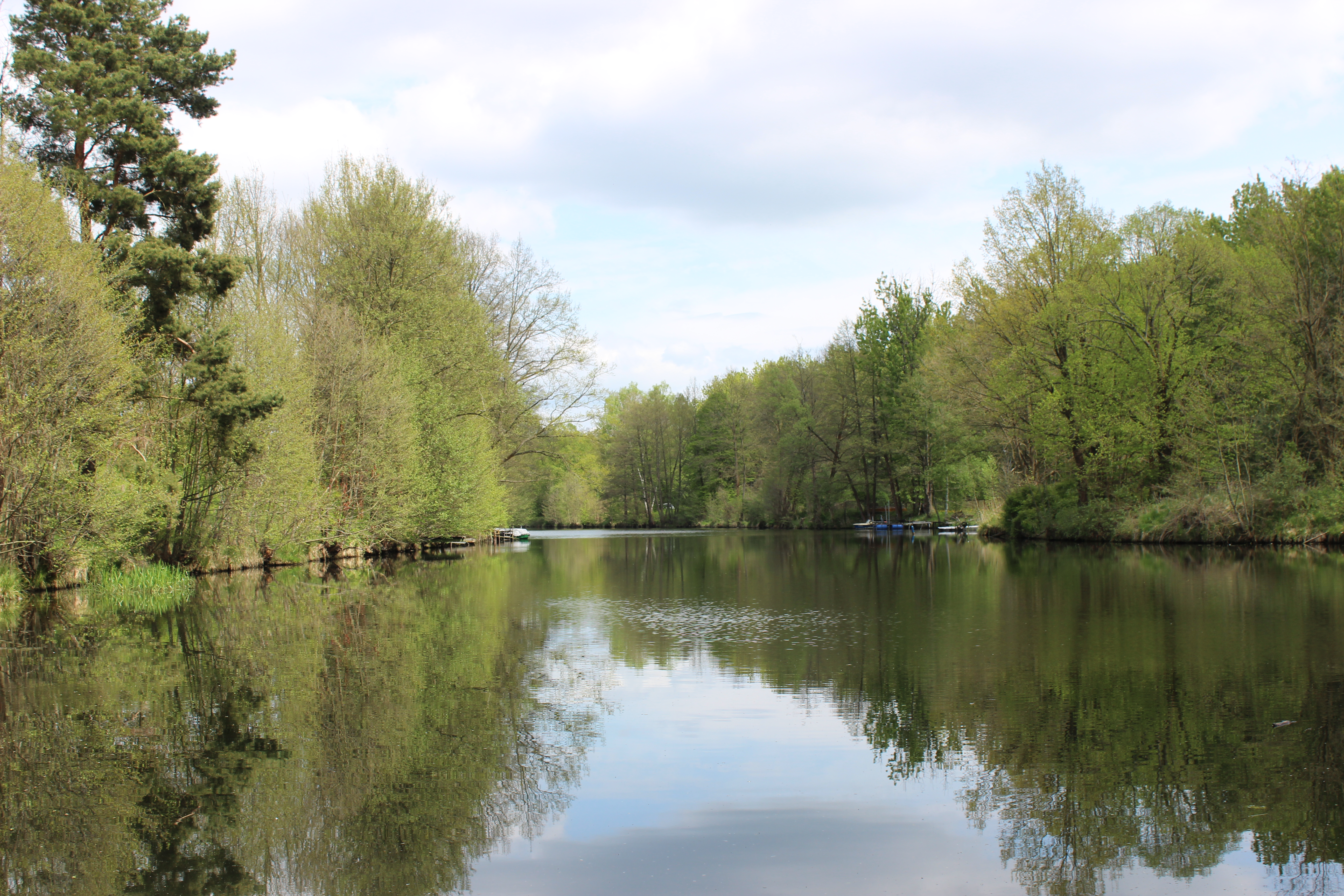 Braunsdorf, links befindet sich eine Wochenendsiedlung